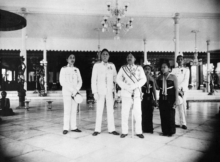 Foto. Van links naar rechts de kroonprins Goesti Kandjeng Pangeran Hamengkoenegoro III, (die overleed rond 1921), zijn vader HB VII en de Susuhunan PB X. Twee bedienden en mogelijk Pakoe Alam.. Groepsportret tijdens een bezoek van de kroonprins, de sultan Hamengkoe Negoro en Prins Pakoe Alam van Jogjakarta aan Pakoe Boewono X, de Susuhunan van Solo